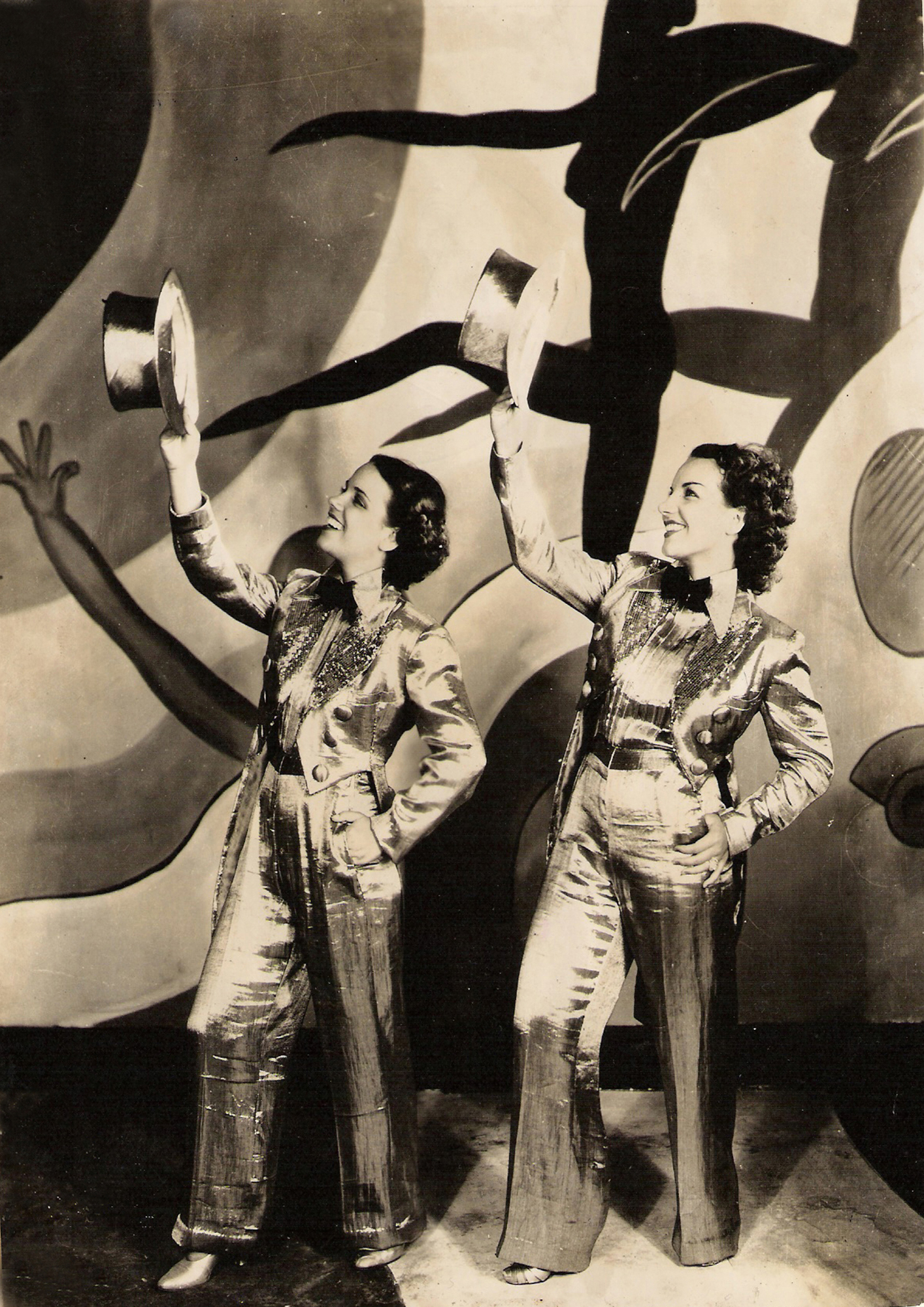 Na foto: As cantoras e irmãs Carmen Miranda e Aurora Miranda no filme Alô, Alô Carnaval de 1936, cantam juntas a música "Cantoras do Rádio".